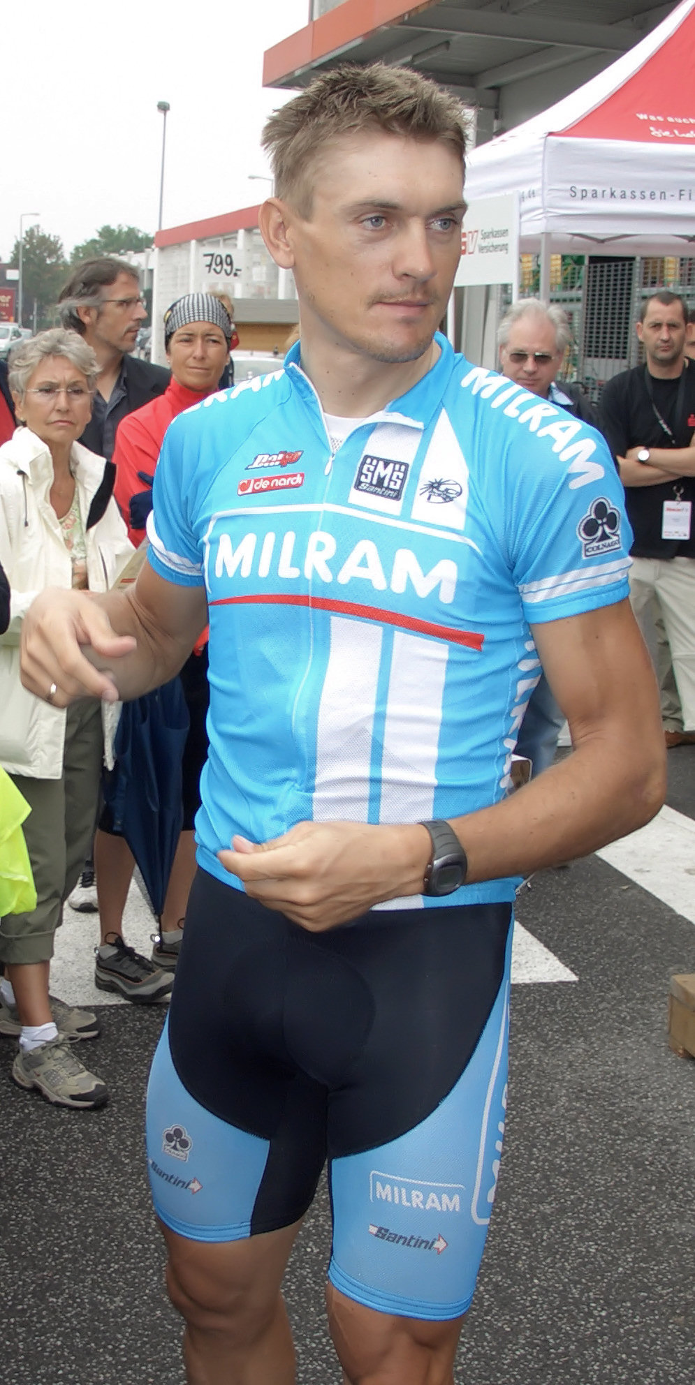 Ralf Grabsch at a bike race in Germany